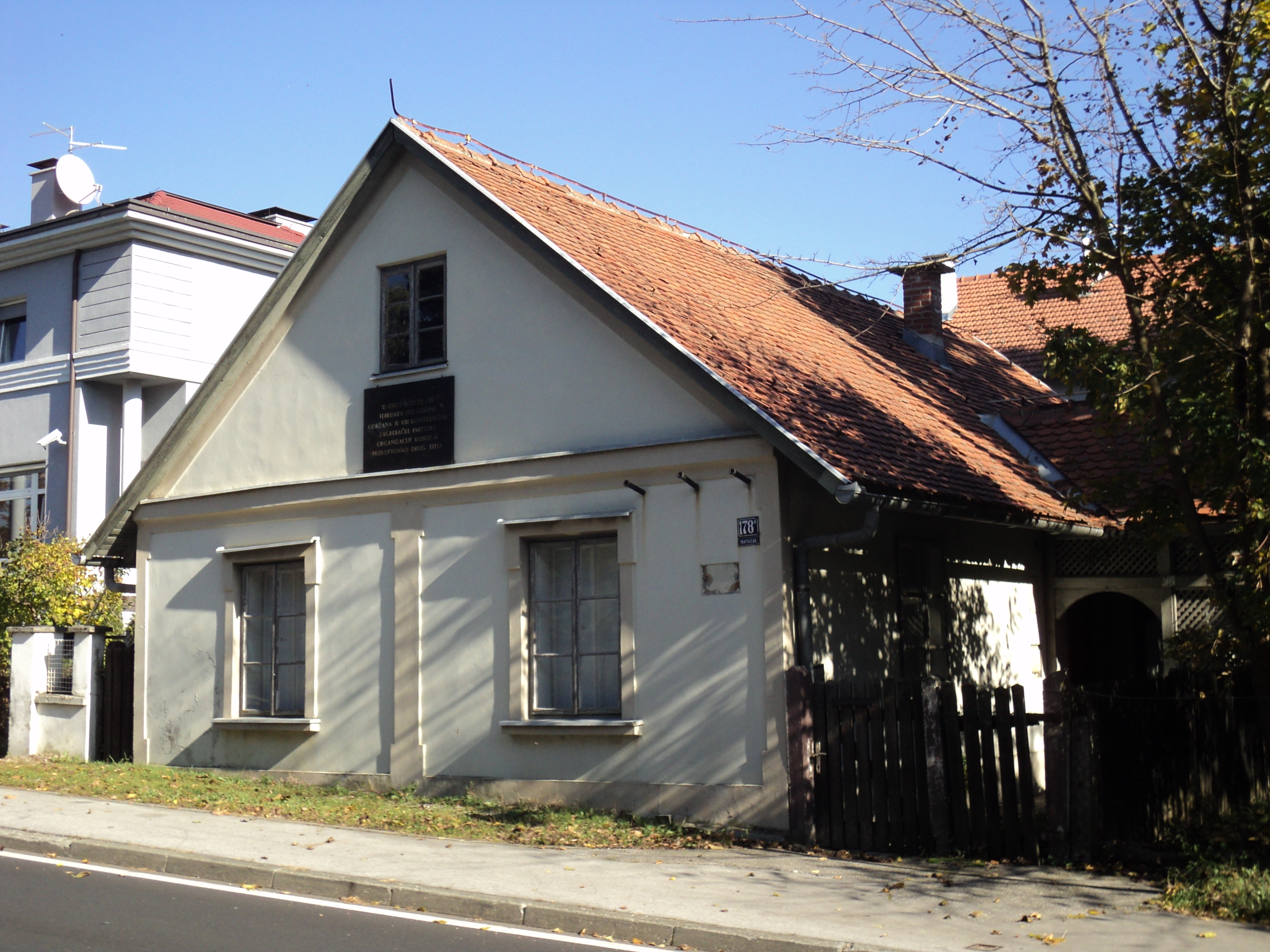 Kuća u Zagrebu u kojoj je 1928. godine održana Osma partijska konferencija KPJ za grad Zagreb. Self-made. Oktobar 2010.